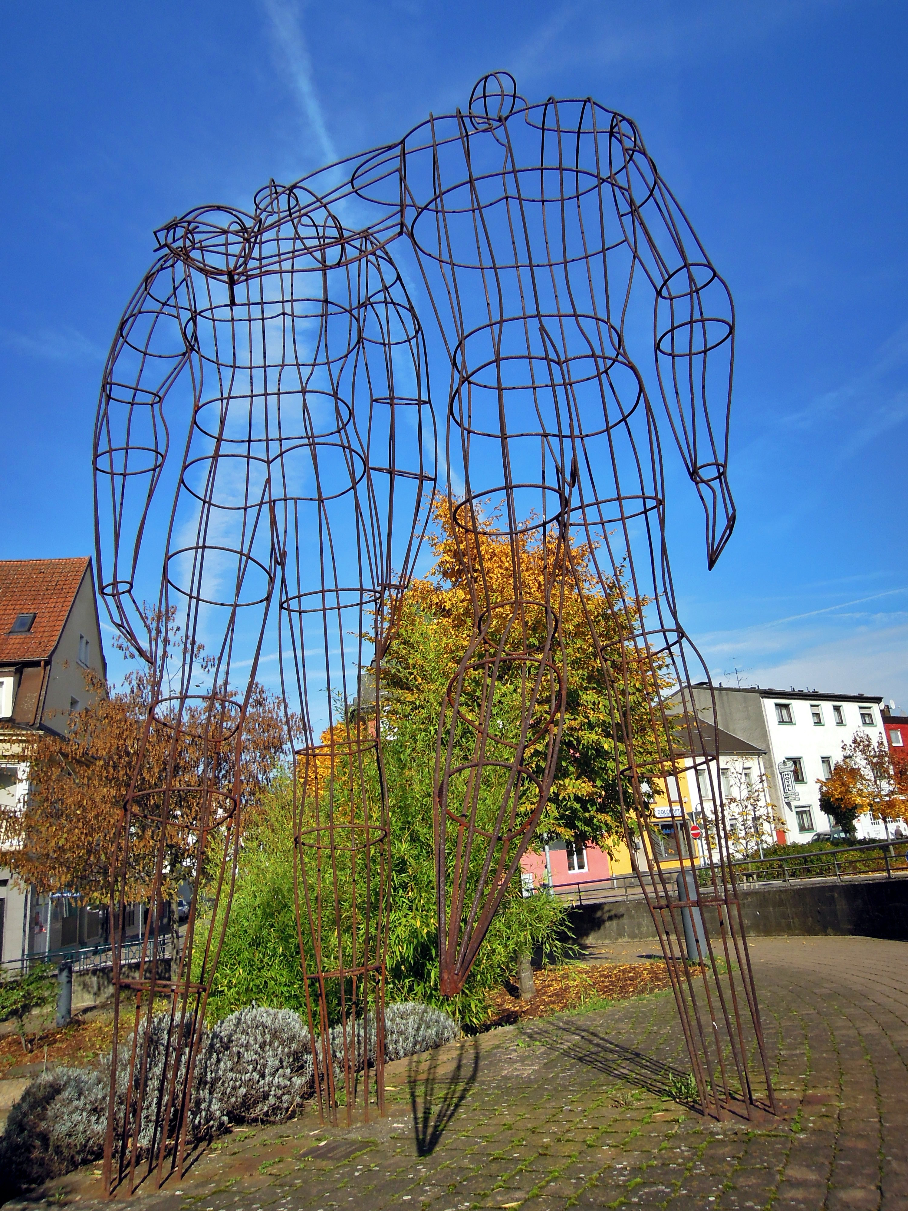 "Nach der Schicht - Les deux camerades" (François Davin) Stahldraht, je 4,70 x 3,10 x 2,00 m, Caritas Krankenhaus, Einfahrt Bypass, vor dem Verwaltungsgebäude, Werk 4, 2000